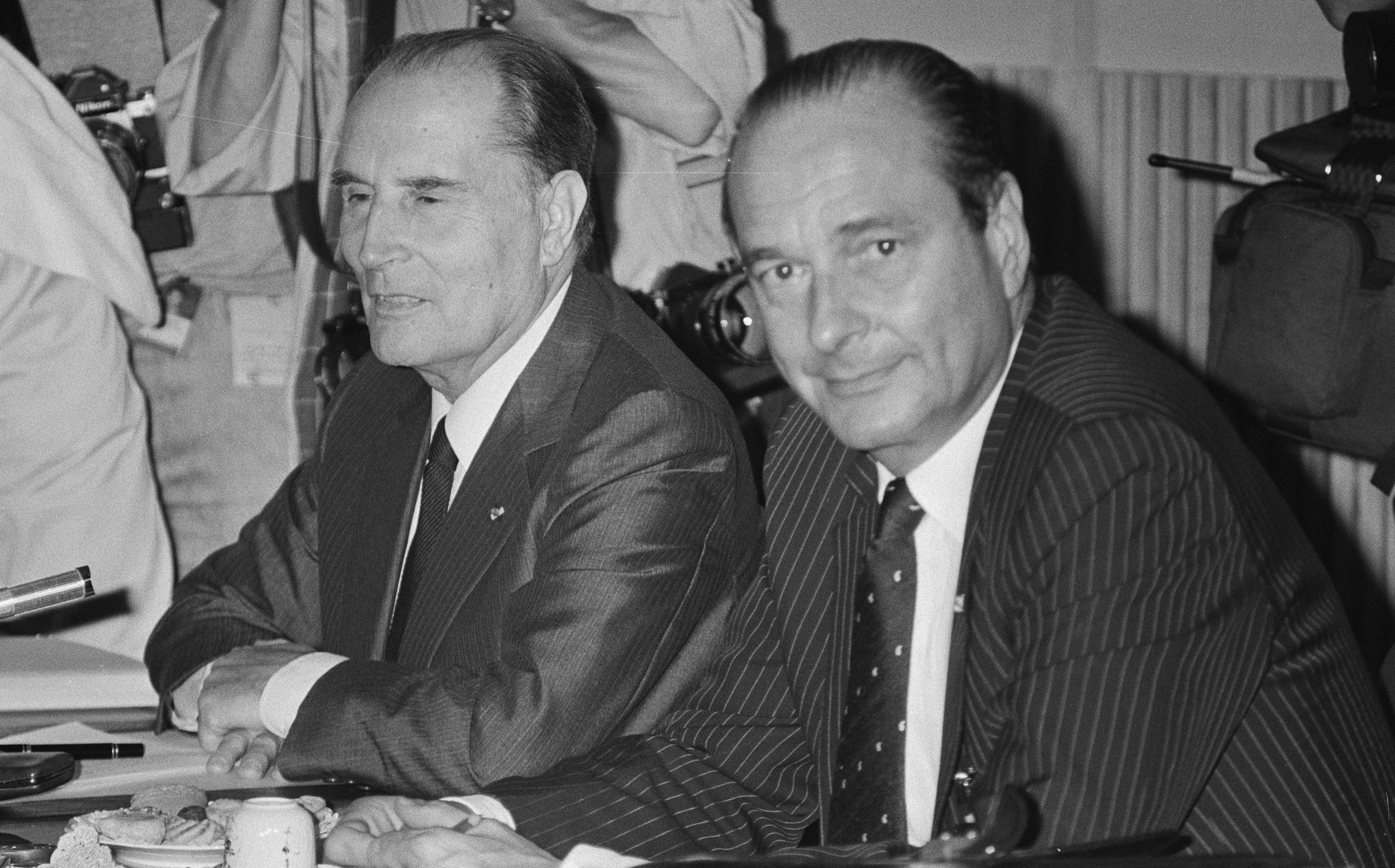 Collectie / Archief : Fotocollectie Anefo Reportage / Serie : [ onbekend ] Beschrijving : EEG-top in Den Haag : vergadering ministers van Buitenlandse Zaken ; vergadering regeringsleiders ( nr. 24 ) Datum : 26 juni 1986 Locatie : Den Haag, Zuid-Holland Trefwoorden : Vergaderingen, ministers Fotograaf : Molendijk, Bart / Anefo Auteursrechthebbende : Nationaal Archief Materiaalsoort : Negatief (zwart/wit) Nummer archiefinventaris : bekijk toegang 2.24.01.05 Bestanddeelnummer : 933-6981 Reacties Geplaatst door Maaike op 11 april 2013 - 12:36. Francois Mitterrand (links) president van Frankrijk en Jacques Chirac, premier van Frankrijk Persoonsnamen: Jacques Chirac; Francois Mitterand